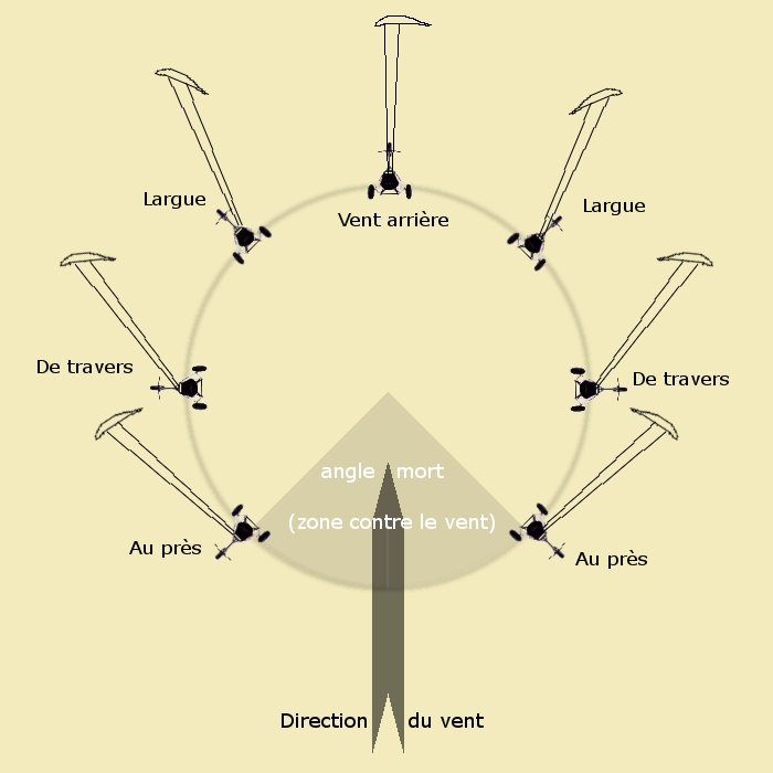 Schéma des différentes 'allures' en char à cerf-volant (kite buggy)